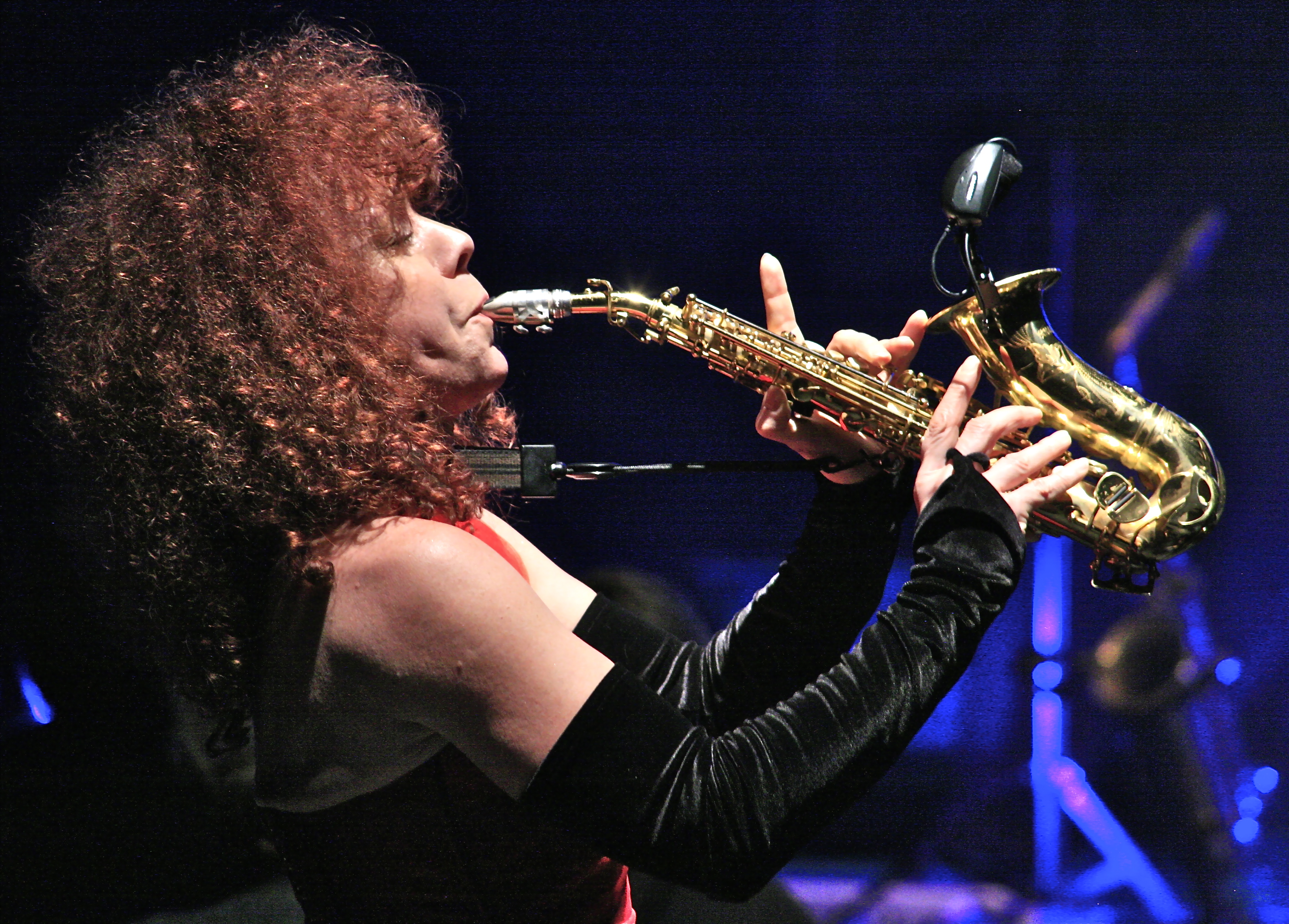 Tina Tandler beim Konzert im Französischen Dom Berlin 2011